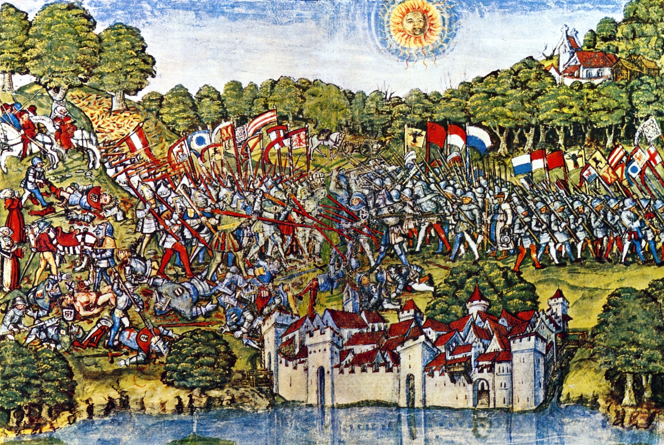 Die Schlacht bei Sempach, 9. Juli 1386 auf einem anonymen Aquarell von 1513. Schweizerisches Landesmuseum